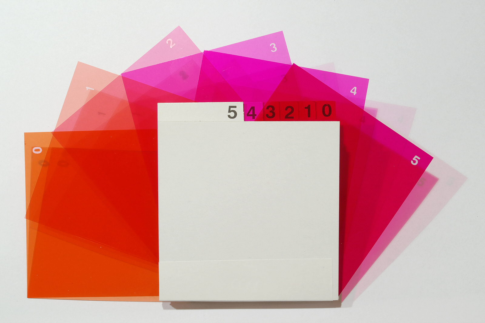 Filtersatz für Schwarzweiß-Gradationswandelpapier (Multigrade) für den Einsatz in der Filterschublade konventioneller Schwarzweißvergrößerer ohne Farbmischkopf.